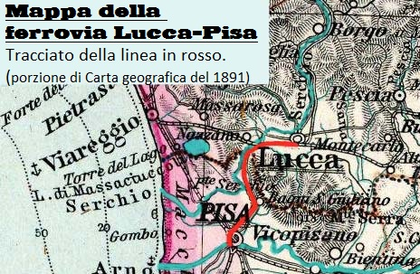 L'immagine è una rielaborazione di porzione del File:Stielers Handatlas 1891 23.jpg già presente su Commons. Interessa l'area tra Lucca e Pisa.